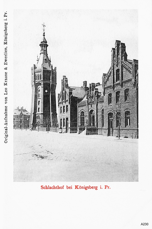 Königsberg (Ostpreußen), städtischer Schlacht- und Viehhof im Stadtteil Rosenau, erbaut 1885